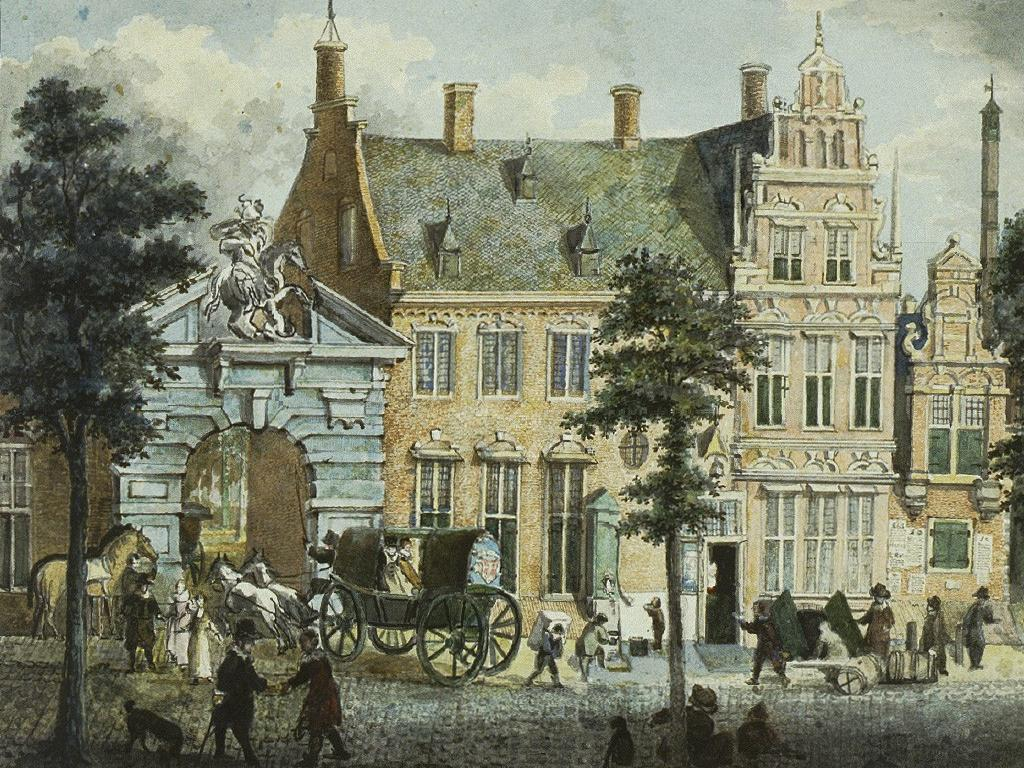 Proveniershuis in Grote Houtstraat in Haarlem